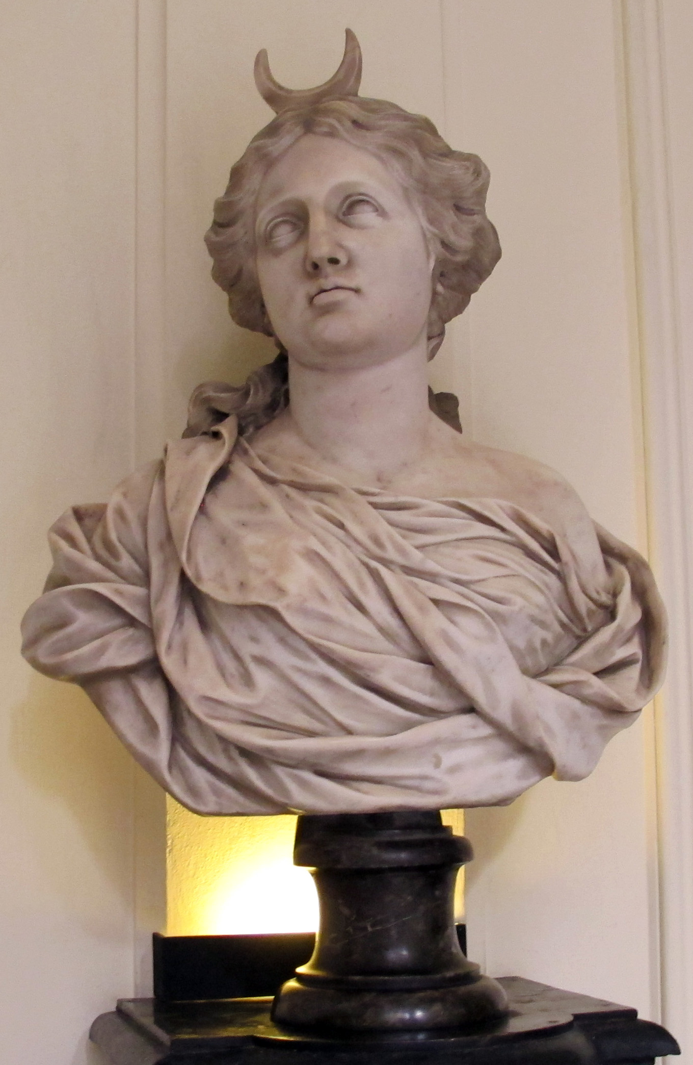 Palazzo gerini, cortile, busti 11 selene